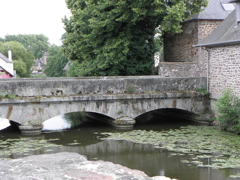 La rivière Le Meu à Montfort-sur-Meu (Ille-et-Vilaine, 35). .